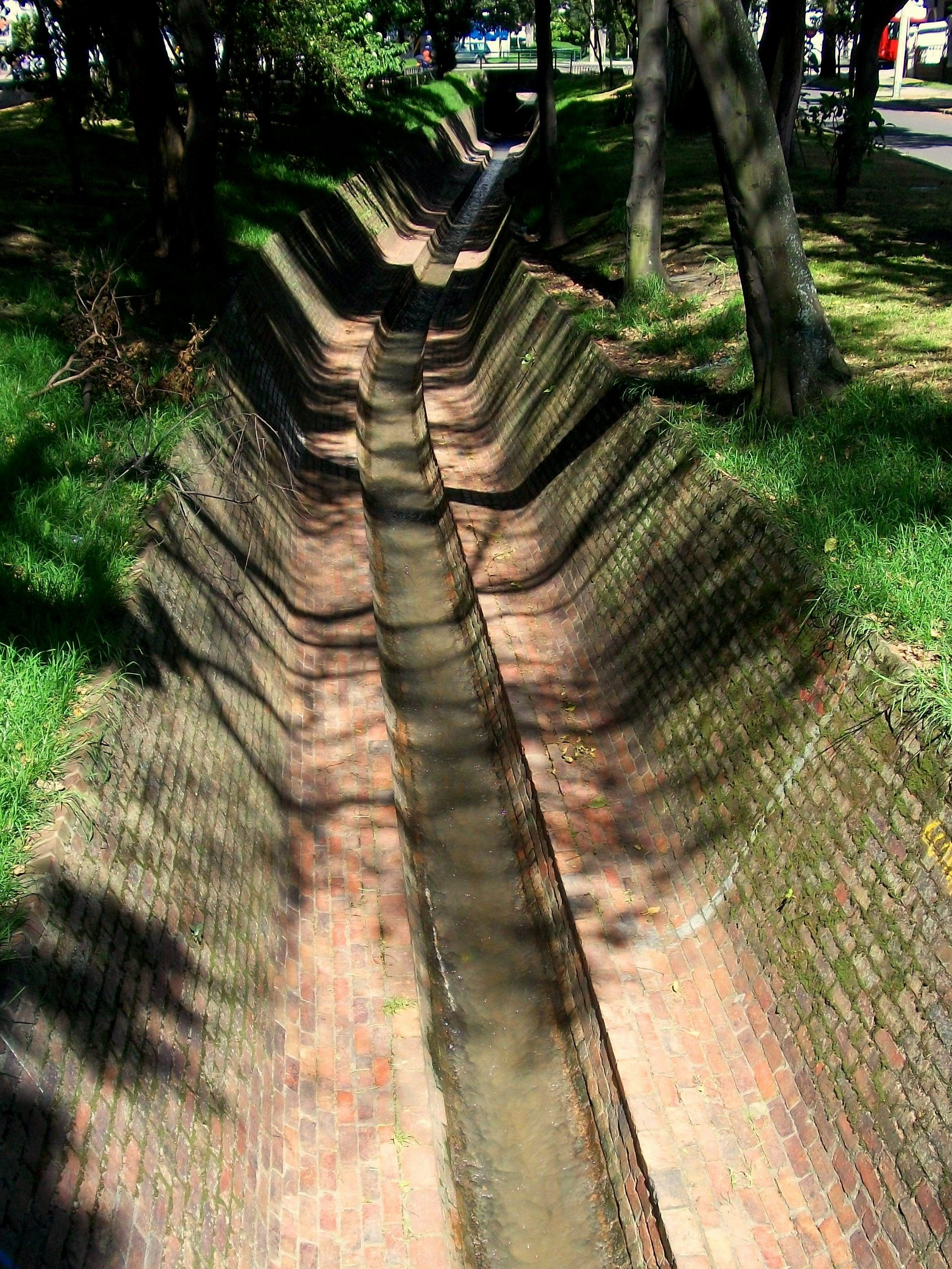 Canal del Arzobispo en Bogotá. Localidad de Teusaquillo.